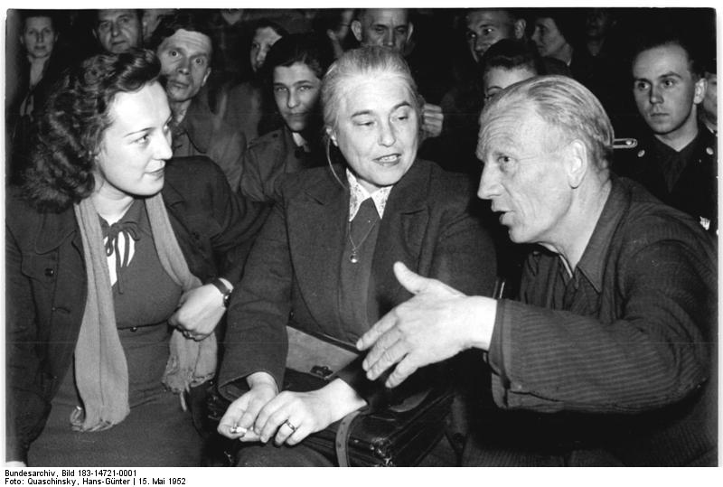 Zentralbild-Quaschinsky 15.5.1952 "Zur Woche des Buches." Am 14. 5. 1952 las die Stalinfriedenspreisträgerin Anna Seghers zur "Woche des Buches" im Kultursaal des Transformatorenwerkes "Karl Liebknecht" aus ihren Werken. UBz: Vor Beginn der Veranstaltung unterhält sich Stalinfriedenspreisträgerin Anna Seghers (Mitte) mit dem Vorsitzenden der Kulturkommission des Transformatorenwekes "Karl Liebknecht" dem Kollegen Aurich (rechts). Links die Kollegin Klimke vom Amt für Büchereiwesen des Magistrats von Gross-Berlin.